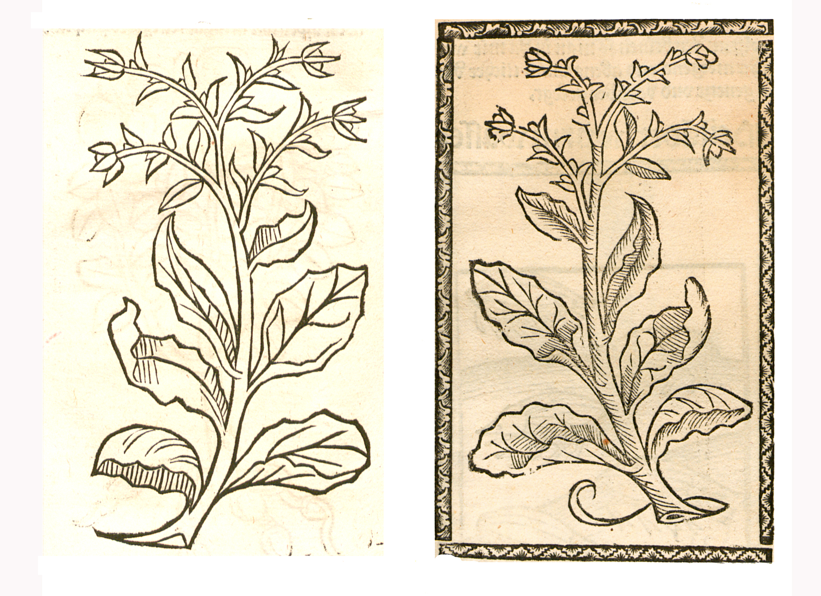 Abbildung von Mangolt Krut (Beta vulgaris)